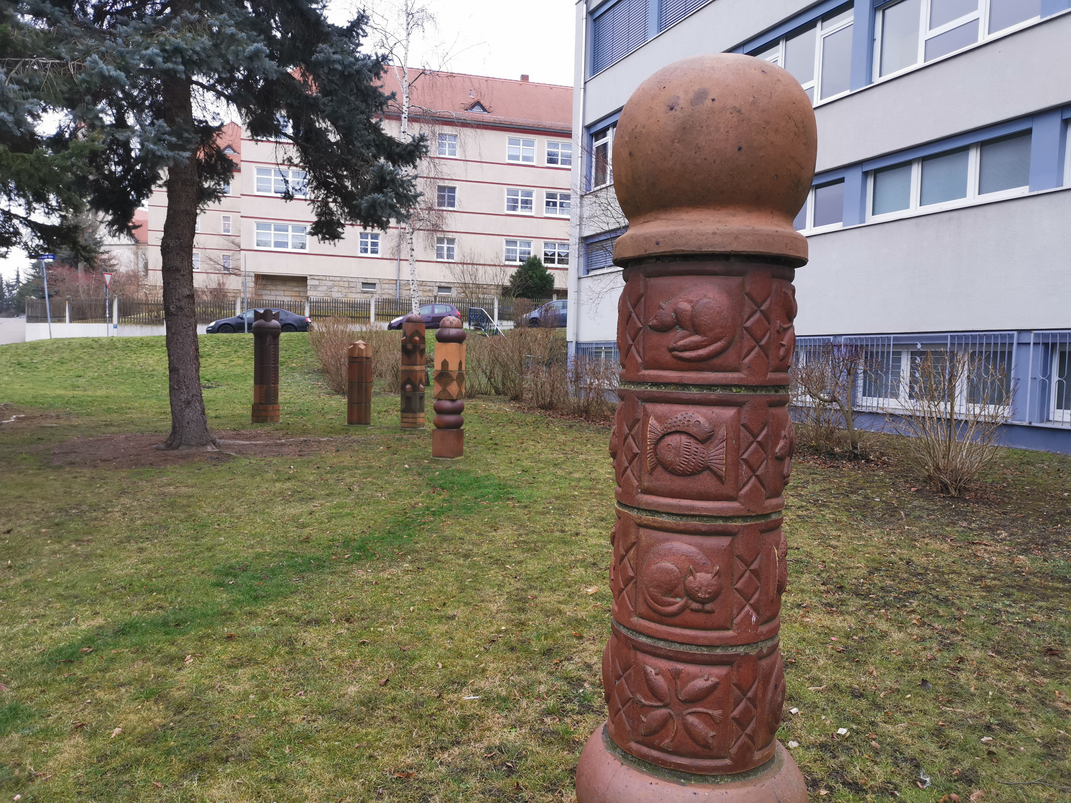 Plastiken von Dieter Graupner vor der Schule in der Gottfried-Keller-Straße 40 in Dresden